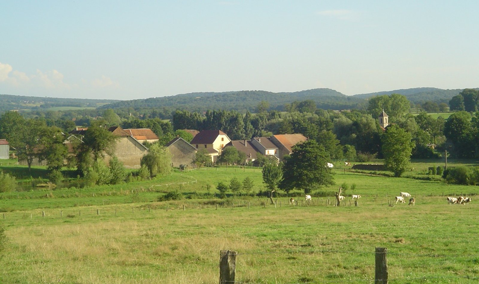 Village de Beveuge vu du nord est